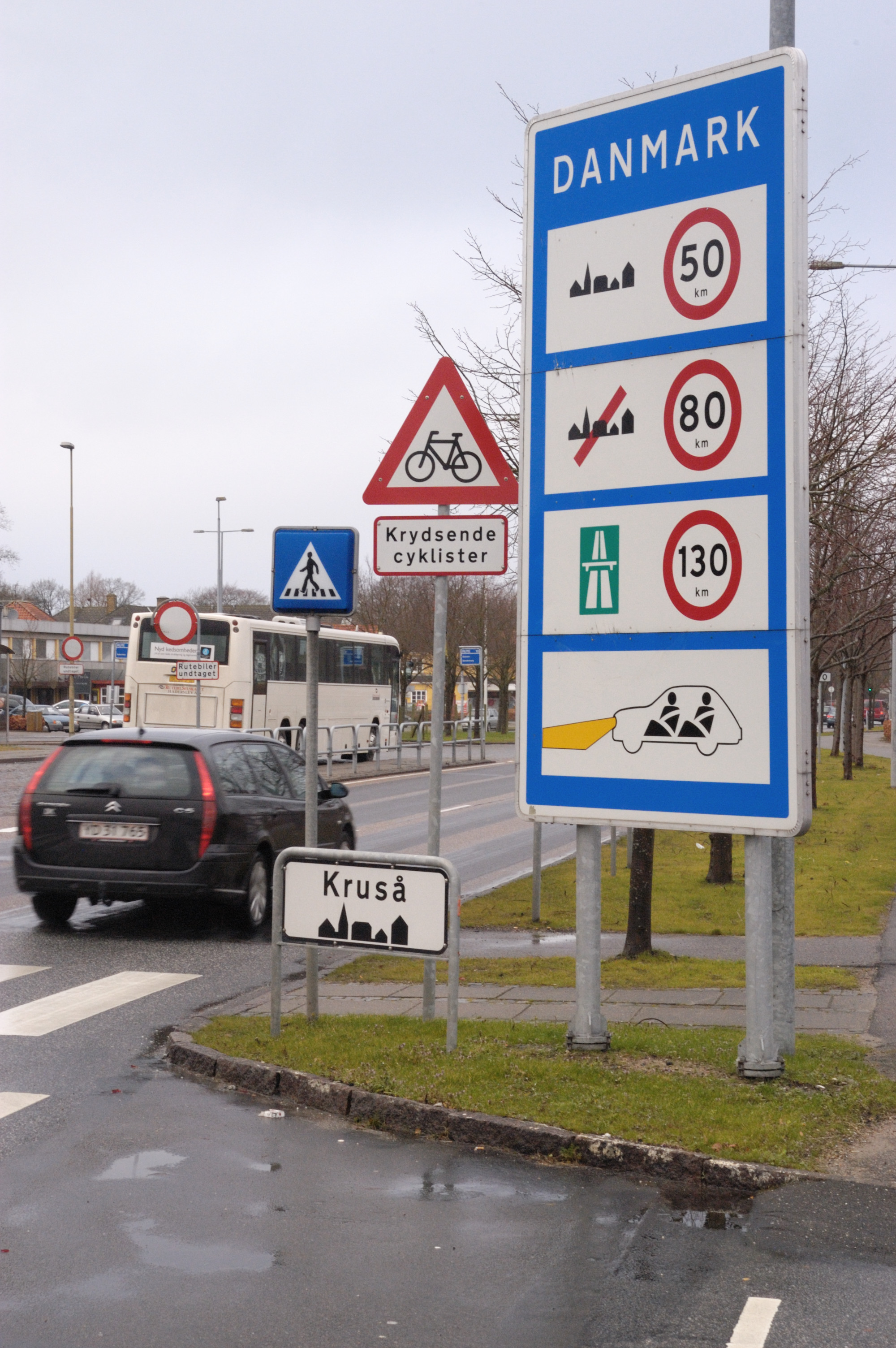 Entering Denmark from Germany at Kruså